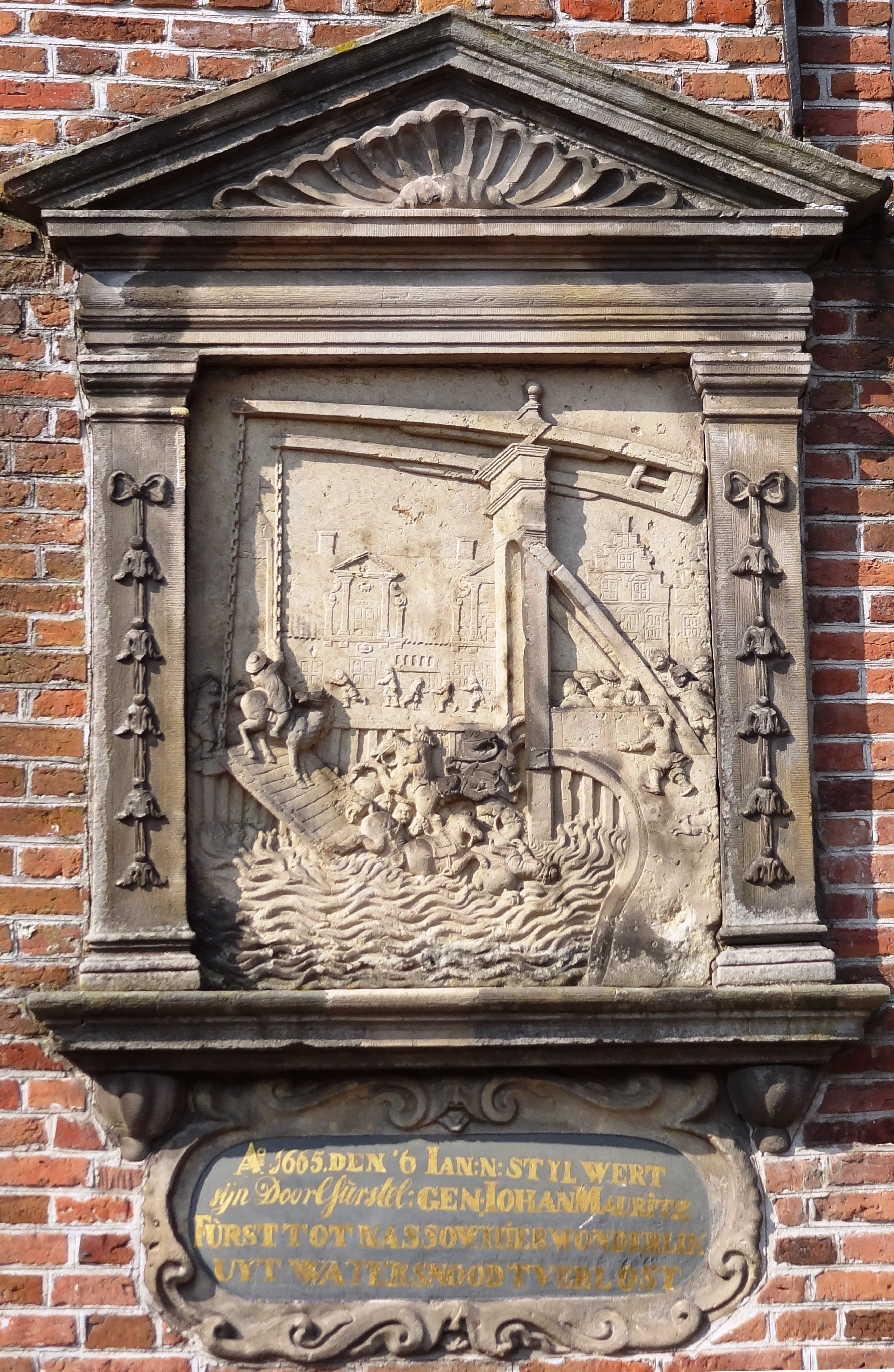 Ongeval prins Maurits, Franeker 1665 nieuwe stijl